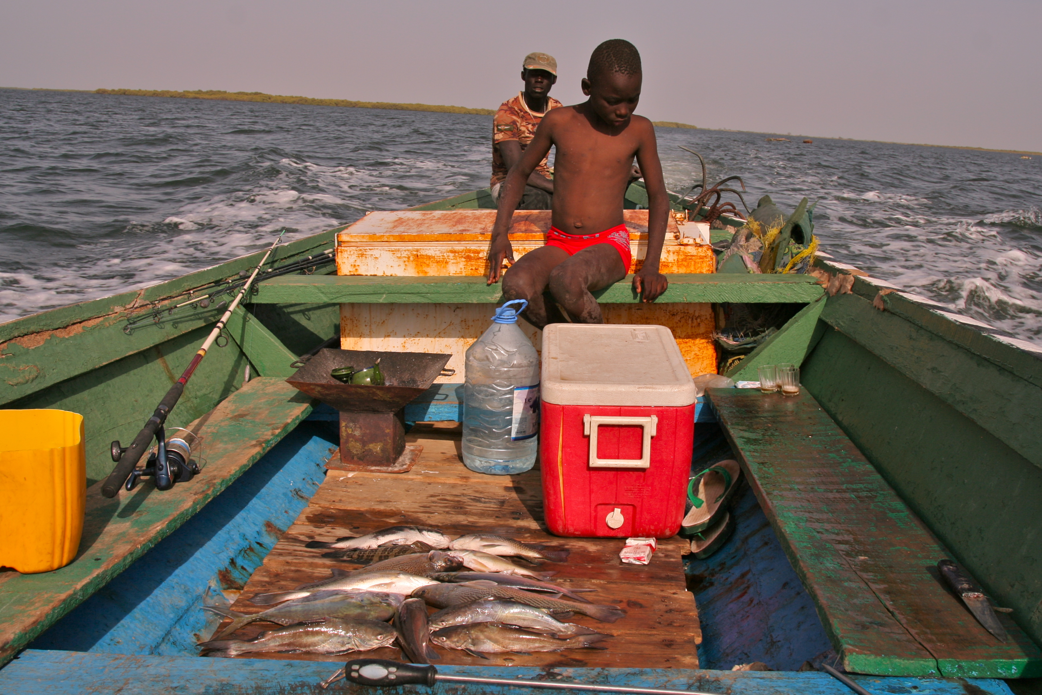 Pêcheurs dans une pirogue dans le Sine Saloum, Sénégal. This is an image with the theme "Africa on the Move or Transport" from: Senegal